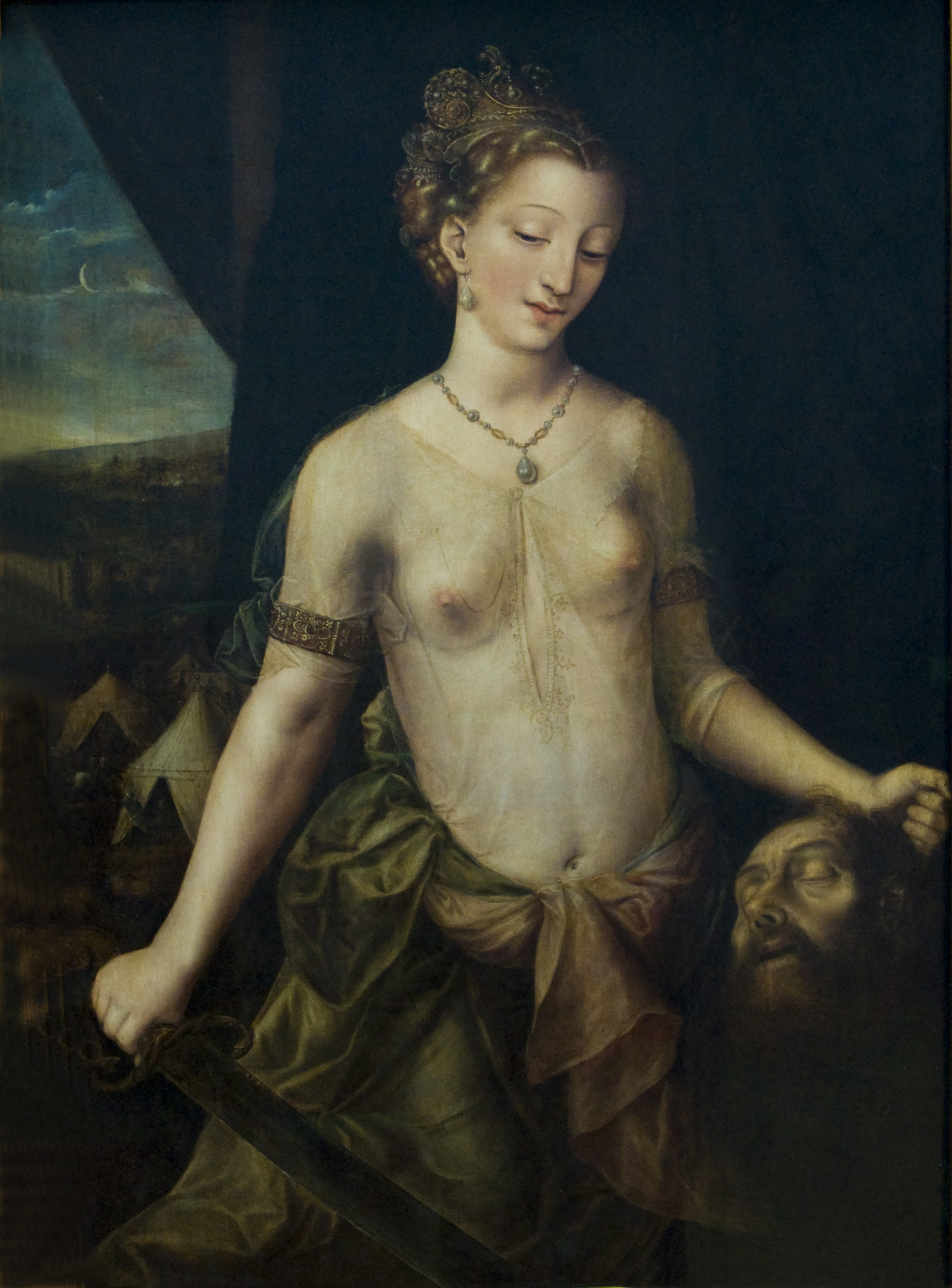 Judith met het hoofd van Holofernestitle QS:P1476,nl:"Judith met het hoofd van Holofernes" label QS:Lnl,"Judith met het hoofd van Holofernes"